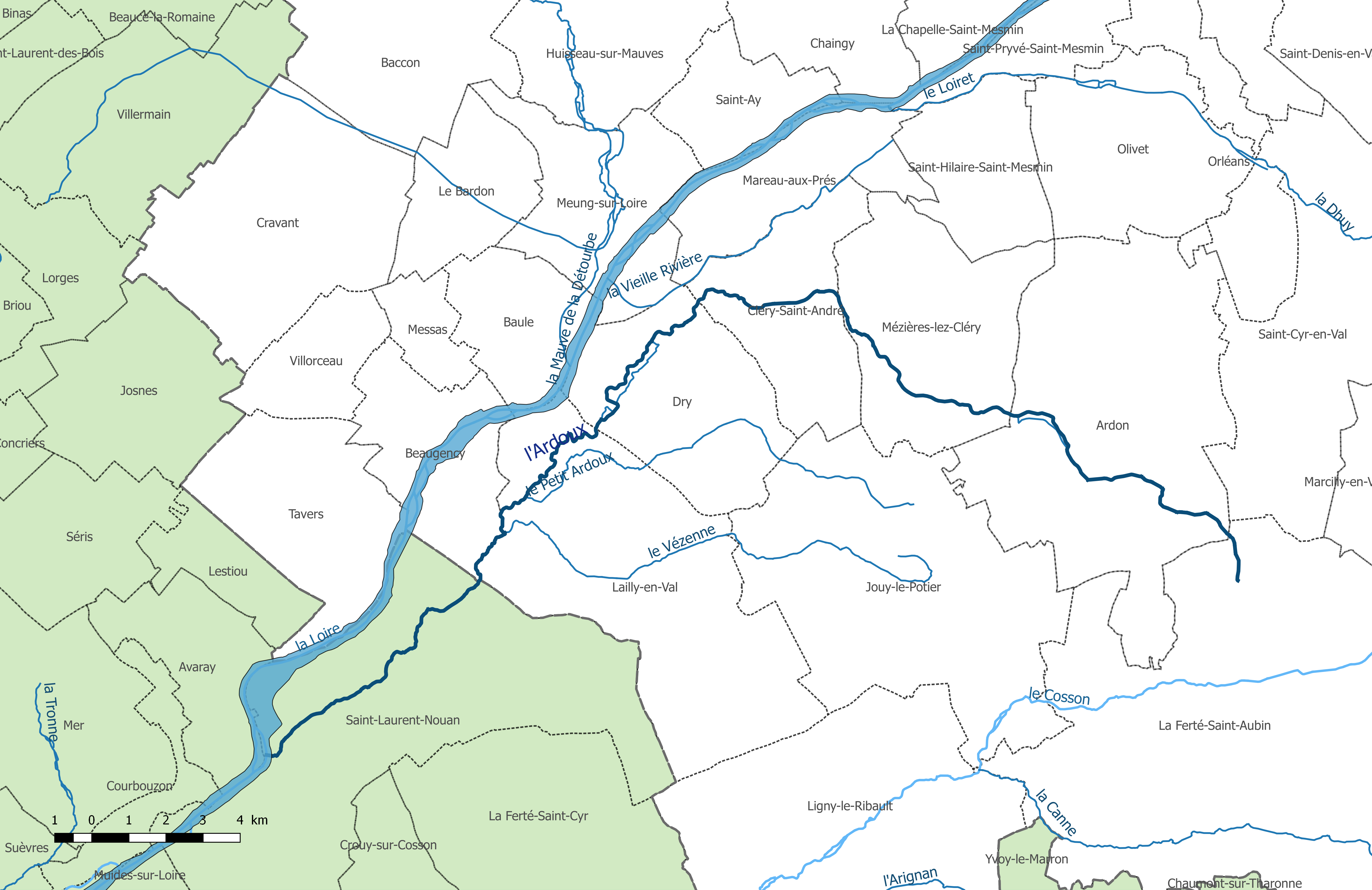 Carte du cours d'eau "l'Ardoux " et de ses affluents, dans le département du Loiret.